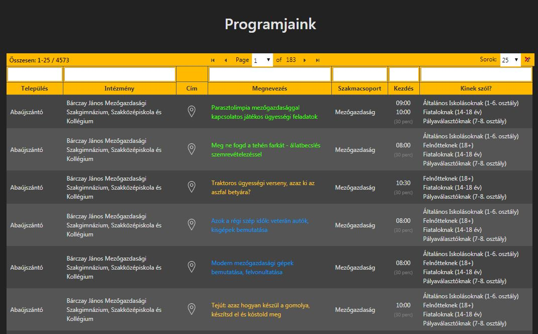 A Szakmák Éjszakája megújult honlapja (2018)